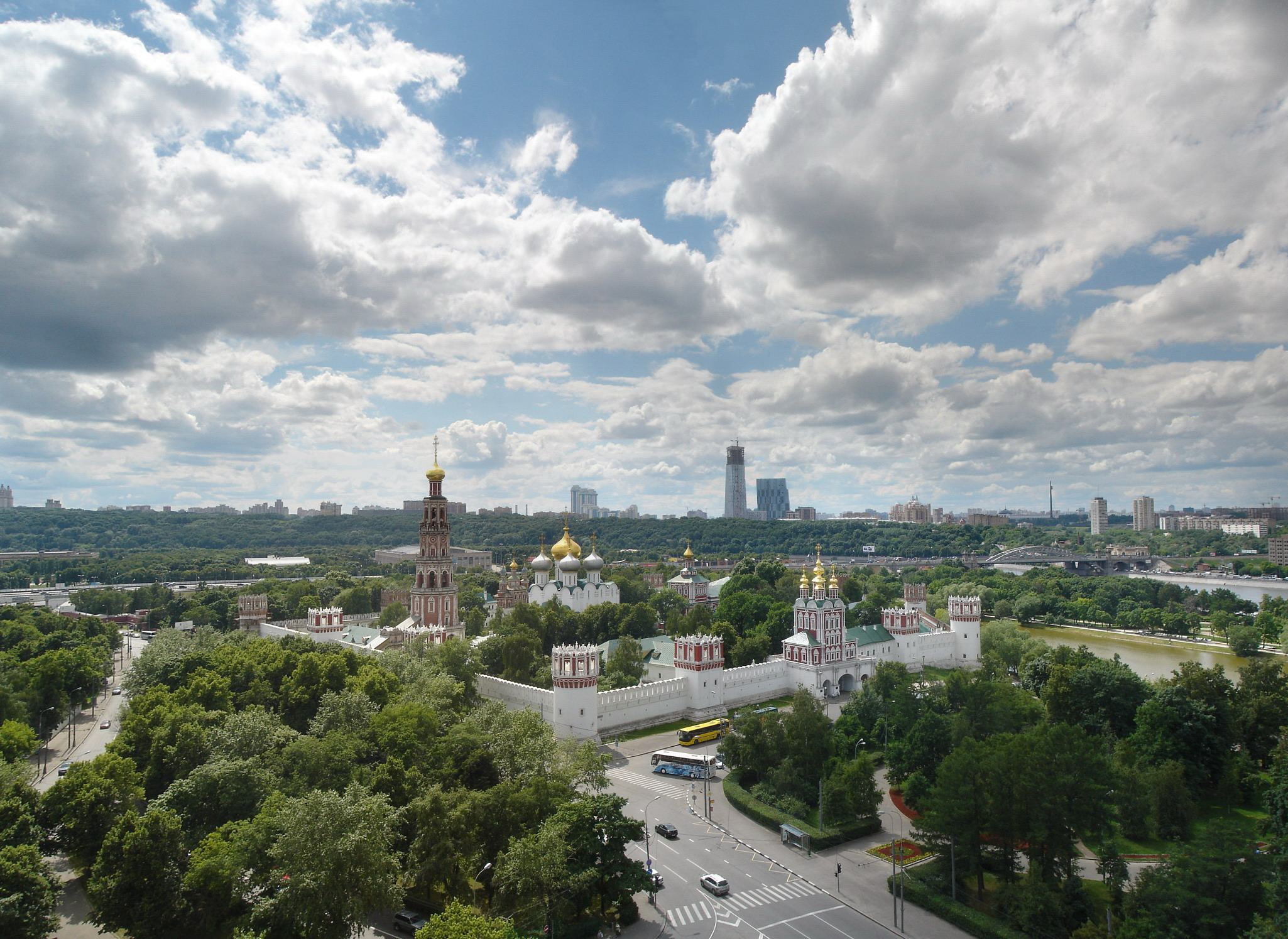 Новодевичий монастырь находится в Москве, недалеко от станции метро "Спортивная", в конце Большой Пироговской улицы по адресу Новодевичий проезд, 1